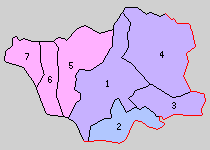 宮崎県西諸県郡の町村制時点の町村。